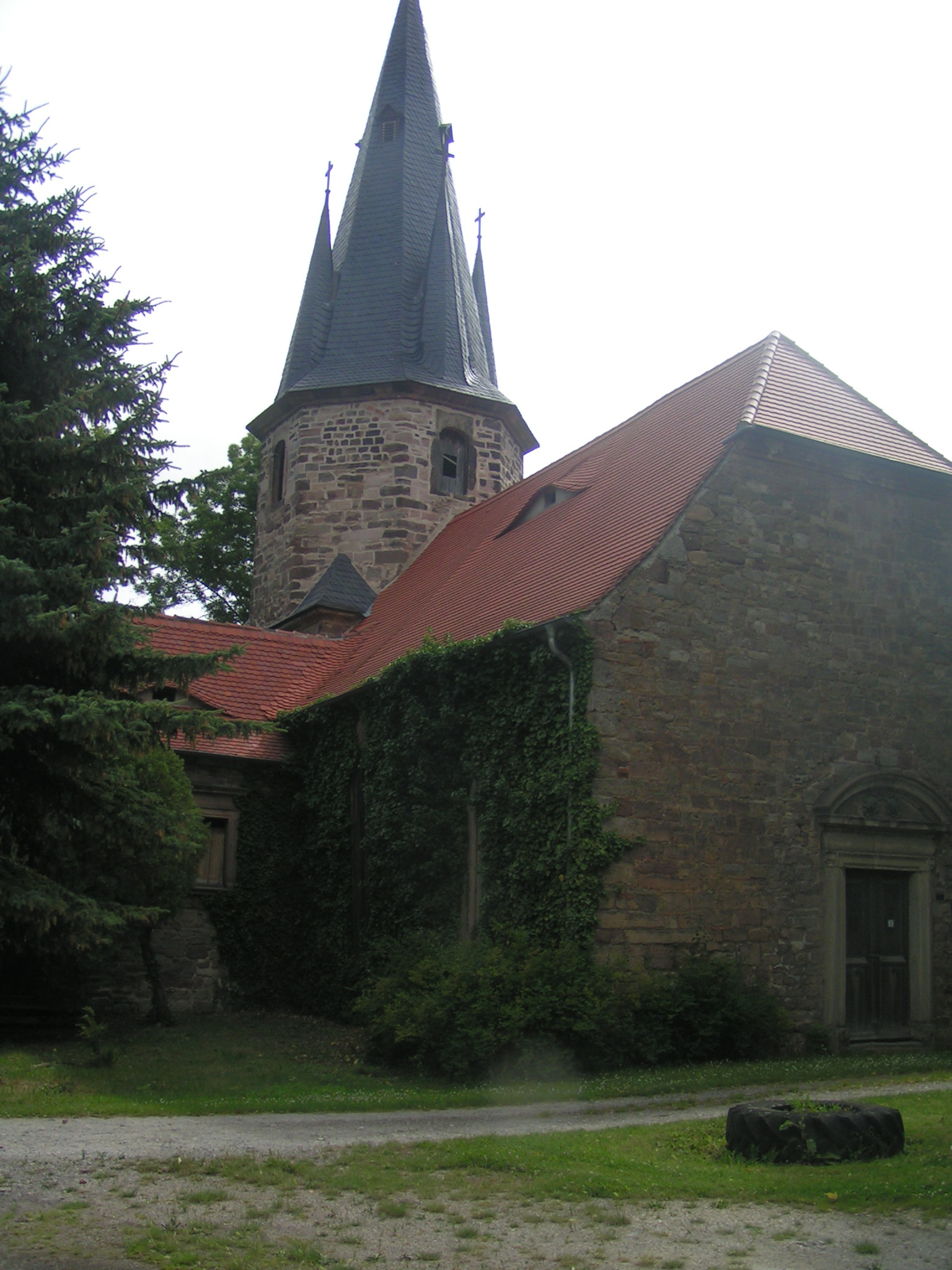 Kirche in Vitzenburg